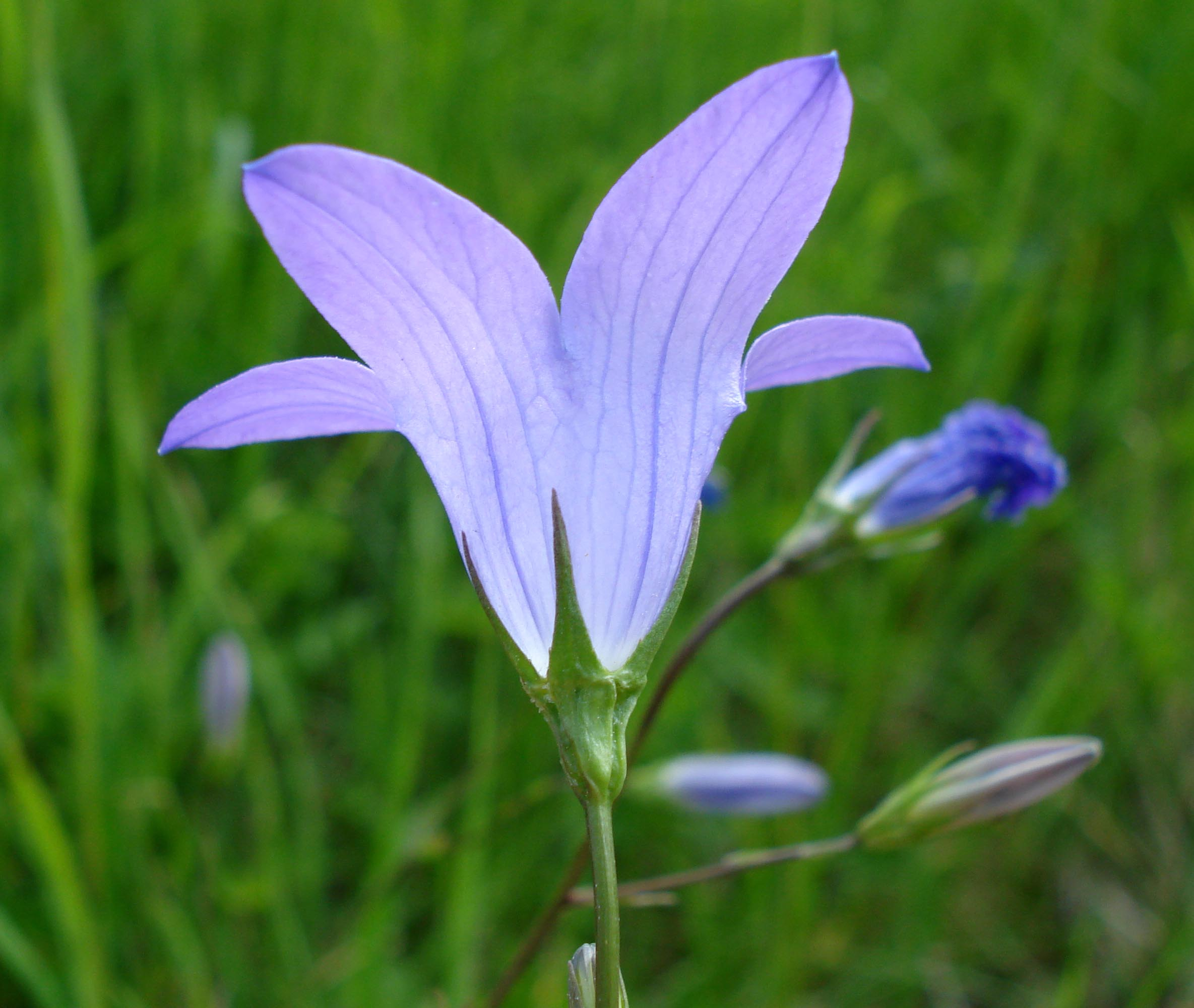 Campanula patula (Unterfranken, Germany)